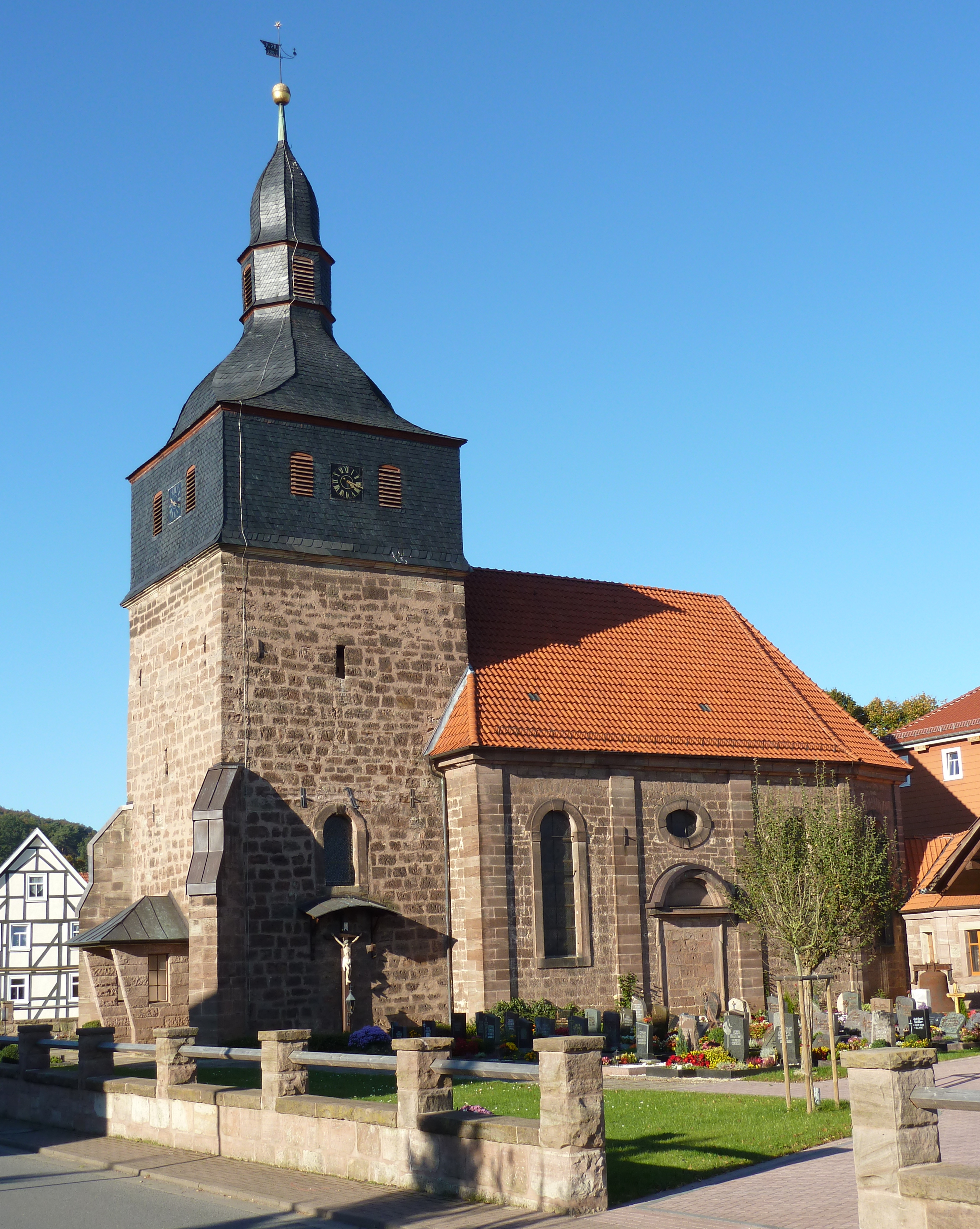 Katholische Kirche St. Johannes der Täufer in Rengelrode, Heilbad Heiligenstadt, Thüringen. Erbaut 1738, heute Filialkirche von St. Marien in Heiligenstadt